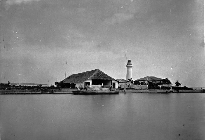 Foto. De vuurtoren en gebouwen van de haven gezien vanaf de rede.